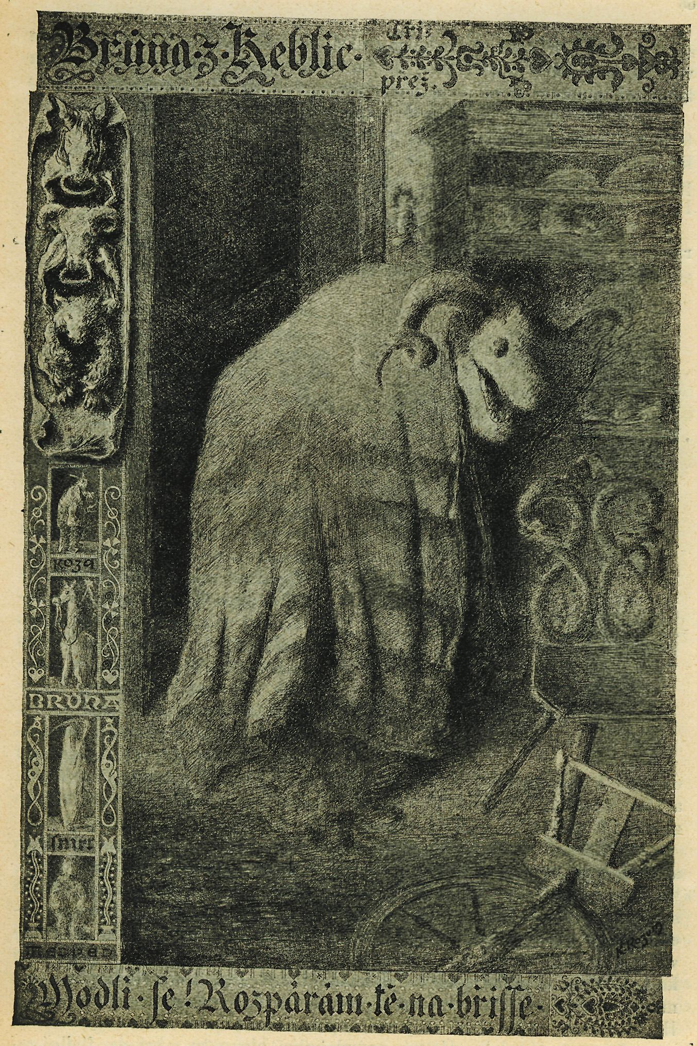 «Овца»